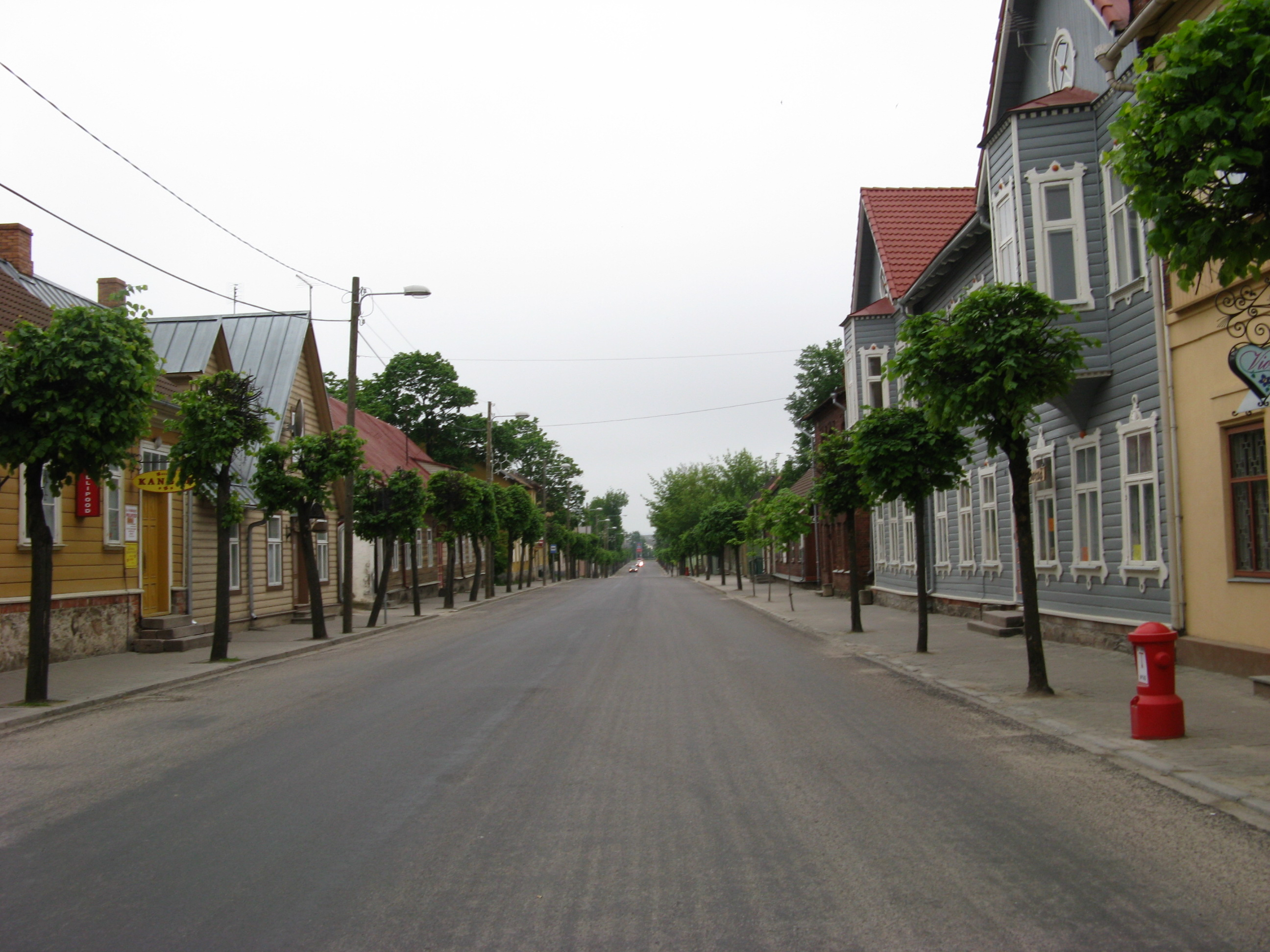 Võru